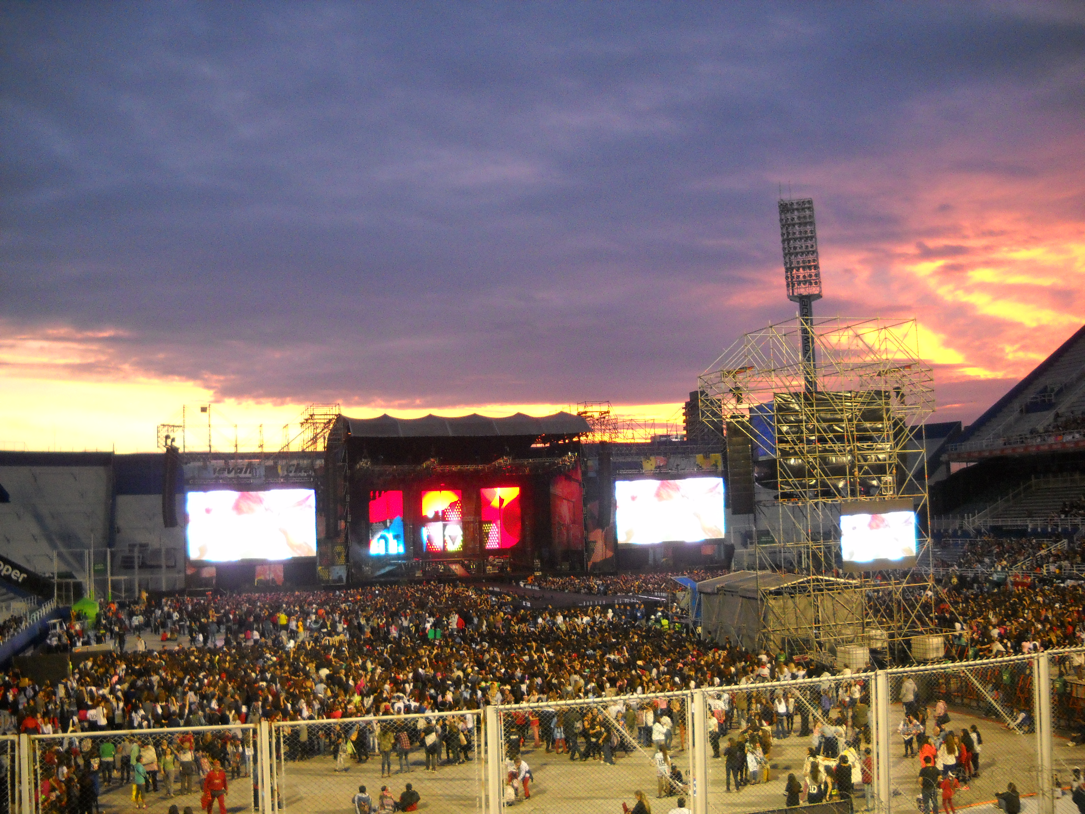 One Direction en El Fortín, el 3 de mayo de 2014.